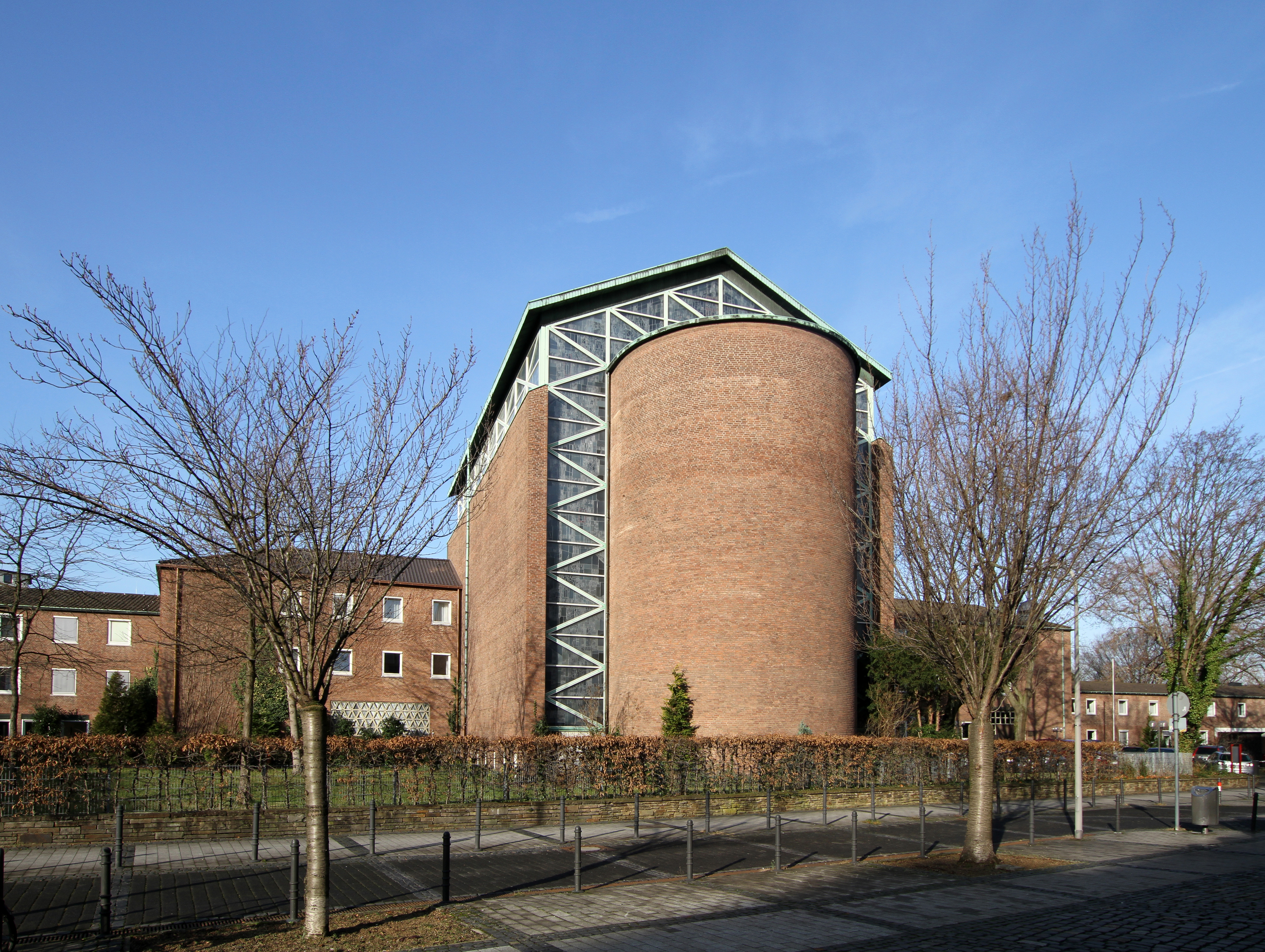 Köln Altstadt-Nord, Kardinal-Frings-Straße 8–12. Erzbischöfliches Haus, Priesterseminar mit Kirche und Verwaltungsgebäude